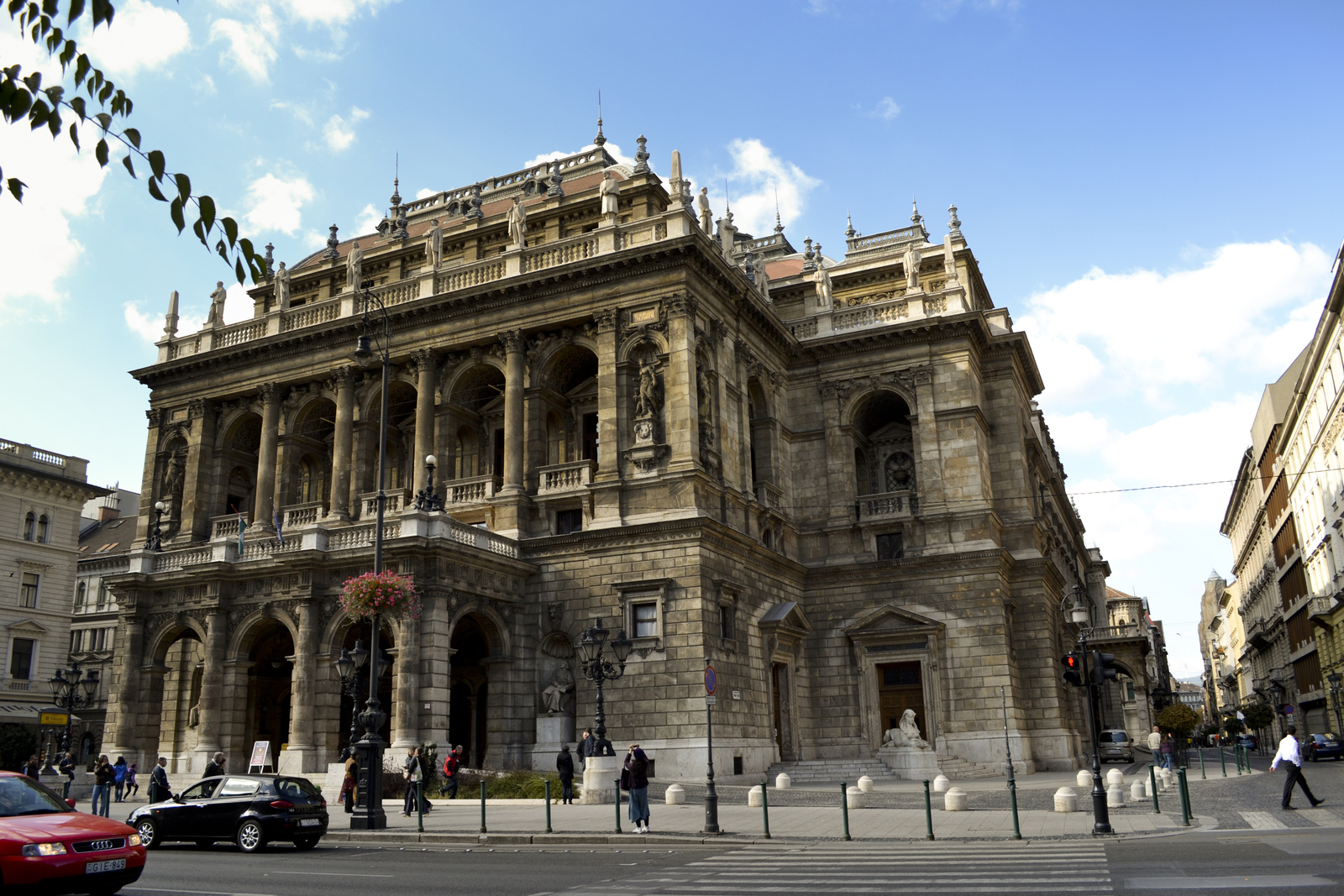 Operaház (Budapest 6, Andrássy út 22., Dalszínház utca 3-9., Hajós utca 4-10., Lázár utca 19.) This is a photo of a monument in Hungary, Identifier: 695